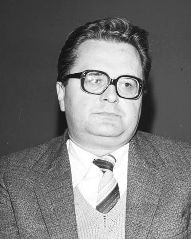 Roman Malinowski, marszałek Sejmu w latach 1989-1985.